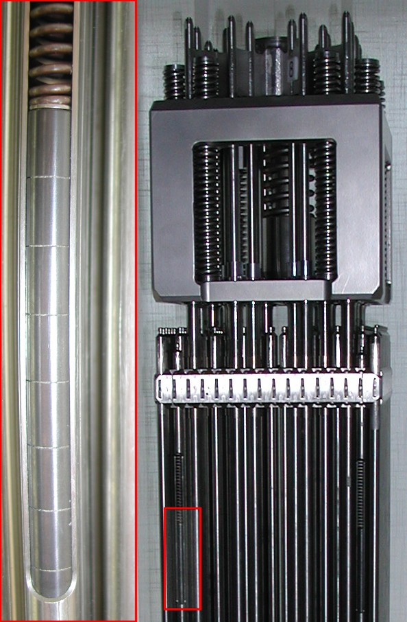 Brennelement in einem Kernkraftwerk Motiv: Kopfbereich eines Brennelementes (Originallänge eines Brennelementes: 483 cm). Links Ausschnittvergrößerung der Uran-Tabletten (Pellets) in den Brennstäben. Foto: Wilfried Wittkowsky, 2005